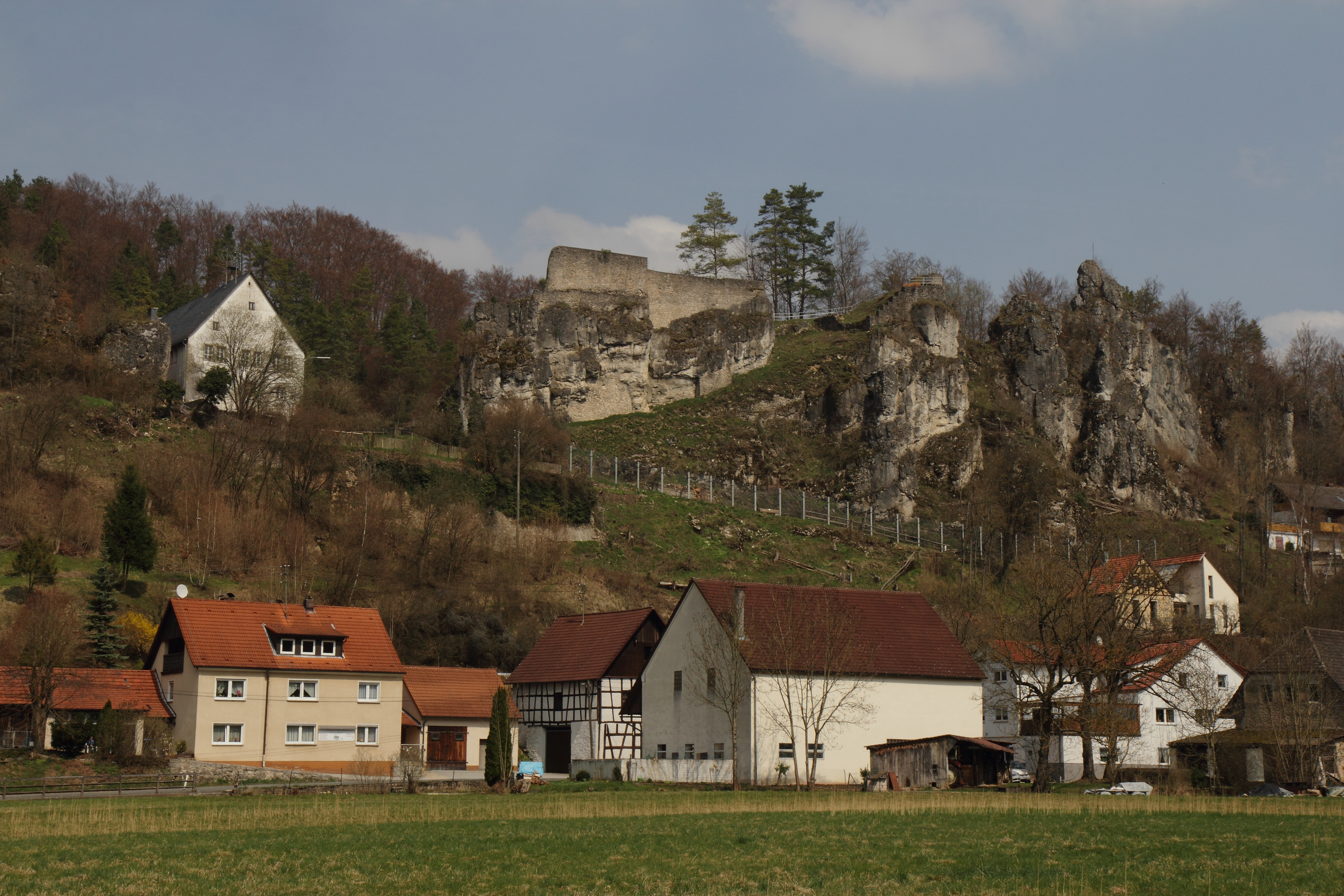 Burgruine Wolfsberg - Ansicht von Ort und Burgruine Wolfsberg aus südwestlicher Richtung